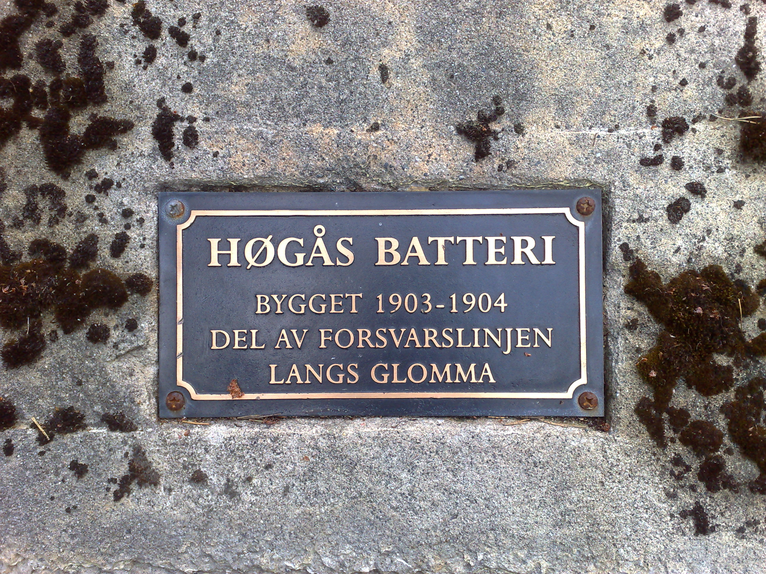 Minneplakett bekostet og oppsatt av Fjeldsrud vel i 2001